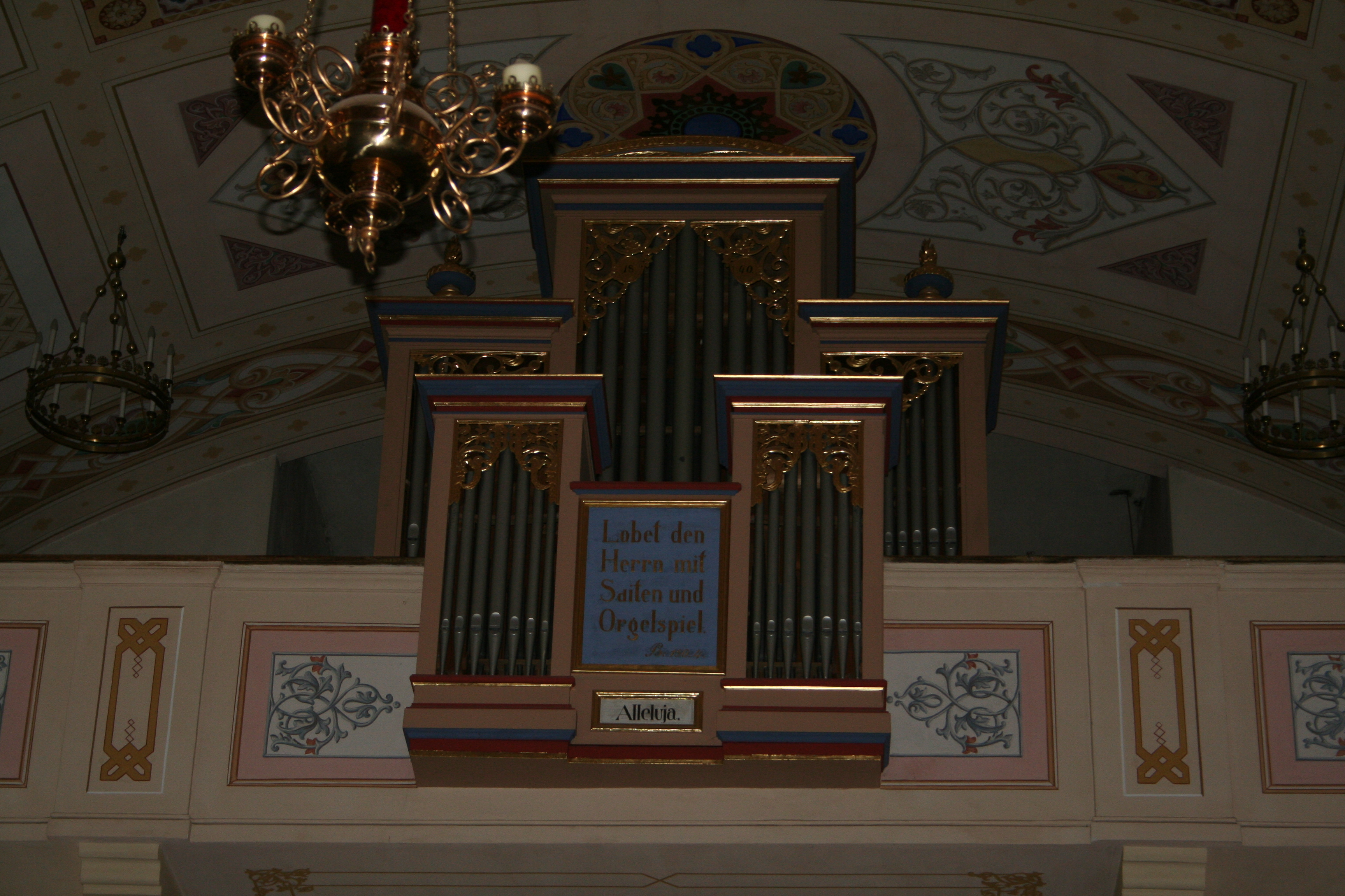 Pfarrkirche Unsere Liebe Frau Mariae Himmelfahrt, Holzgau